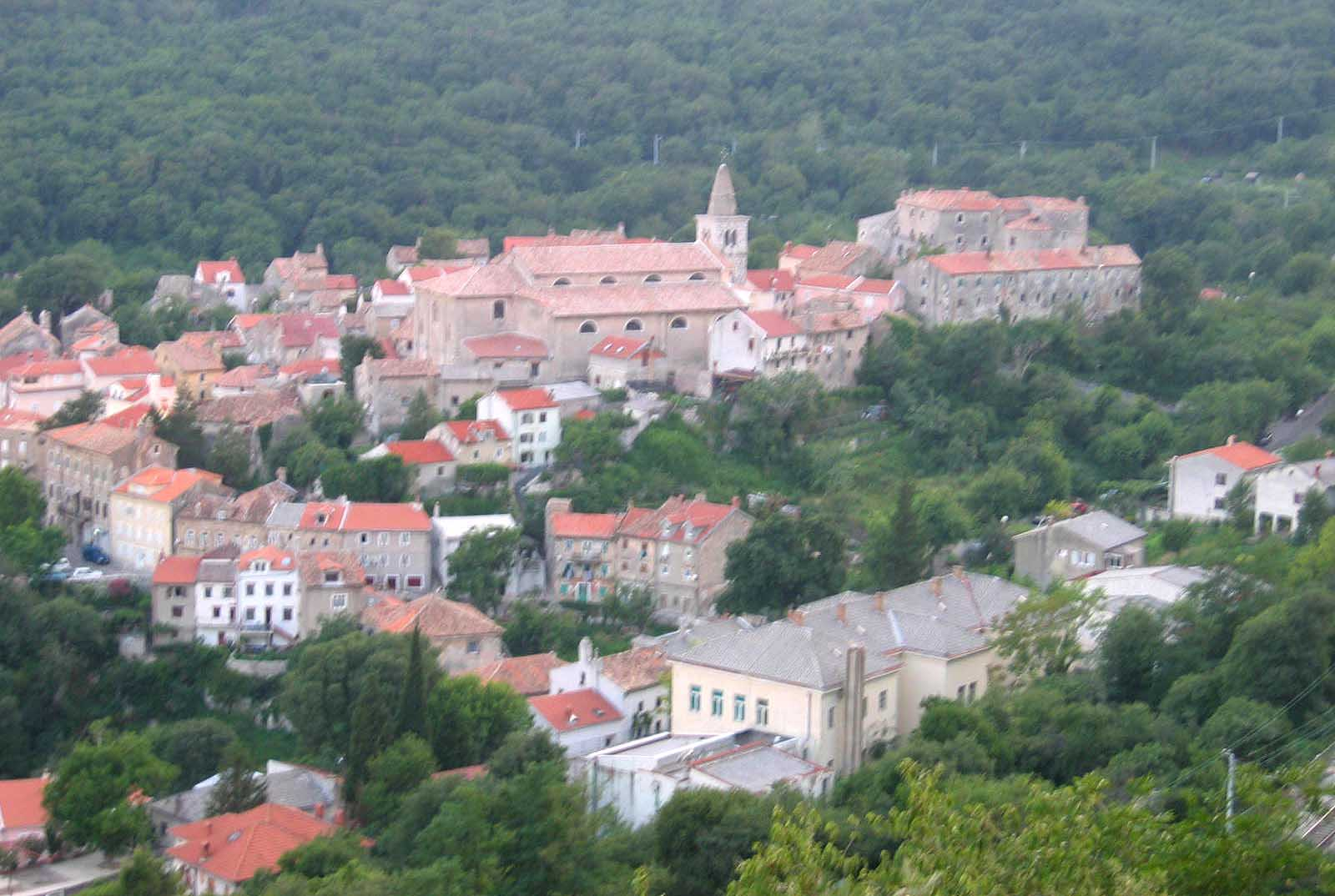 Bakar